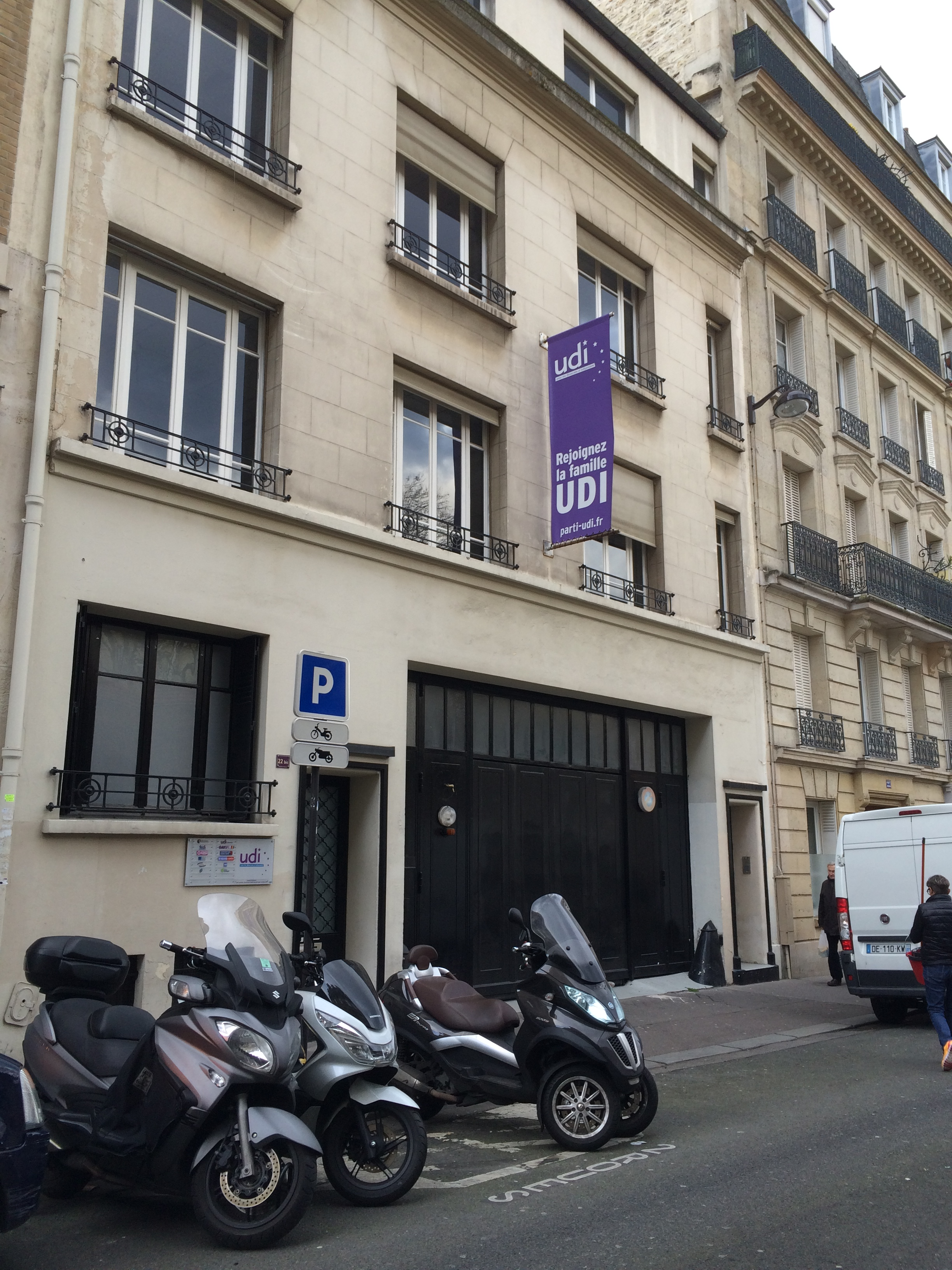 Siège de l'UDI (parti politique français), 22 bis rue des Volontaires à Paris.